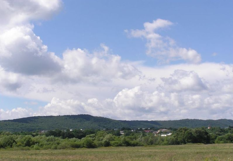 Celkový pohľad